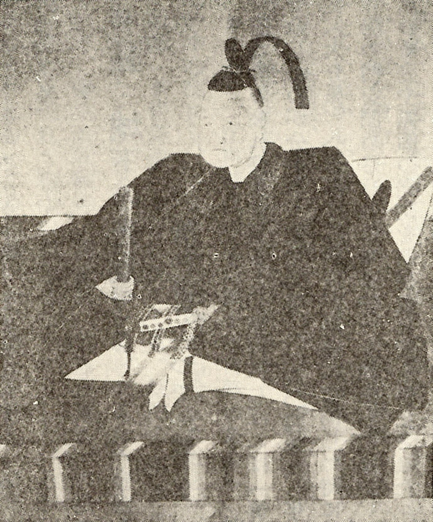 浅野重晟の肖像(原物は、広島の原爆投下により滅失)。